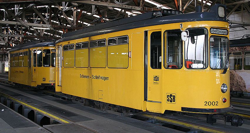 Die Schienenschleifwagen 2002 und 2003 abgestellt im Depot Bad Cannstatt